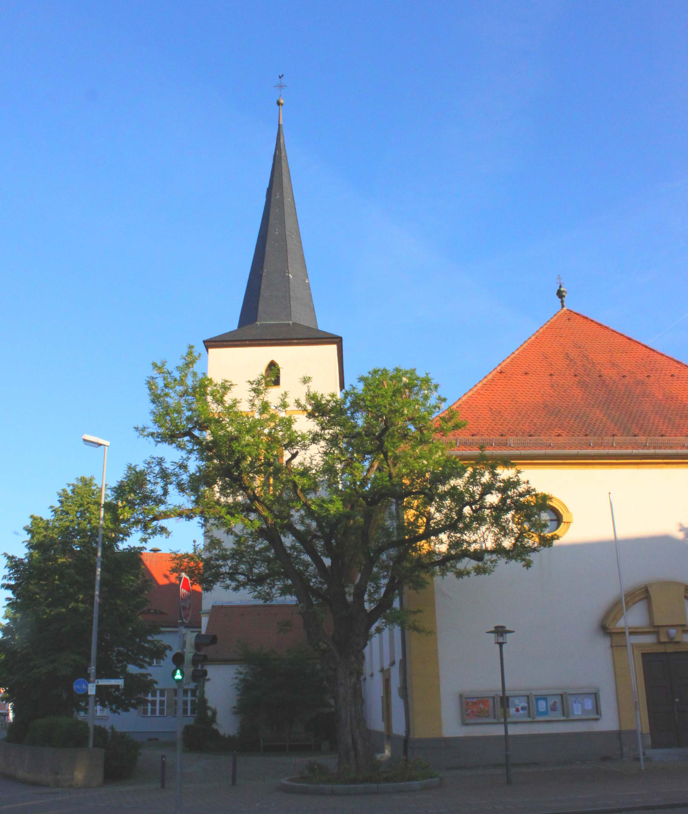 Die Hirschaider Pfarrkirche St. Vitus wurde in den Jahren 1725-28 gebaut